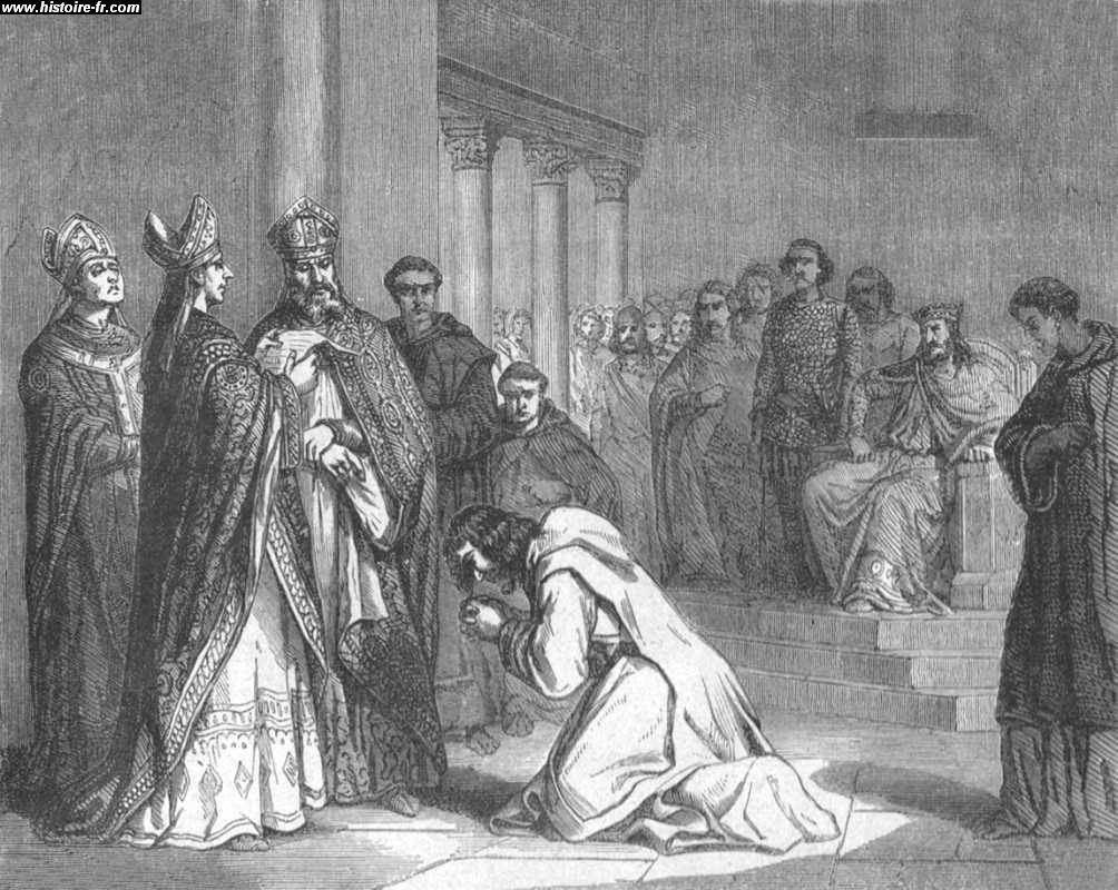 L'humiliation de Louis le Pieux, par Paul Lehugeur, XIX° siècle.